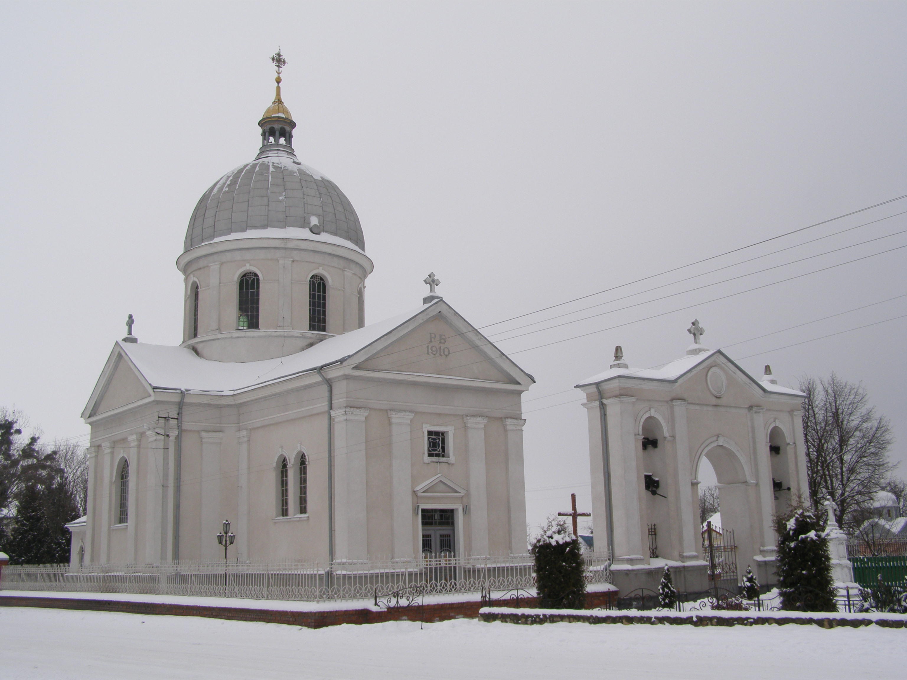 Храм Вознесенський Господнього. с. Новий Витків